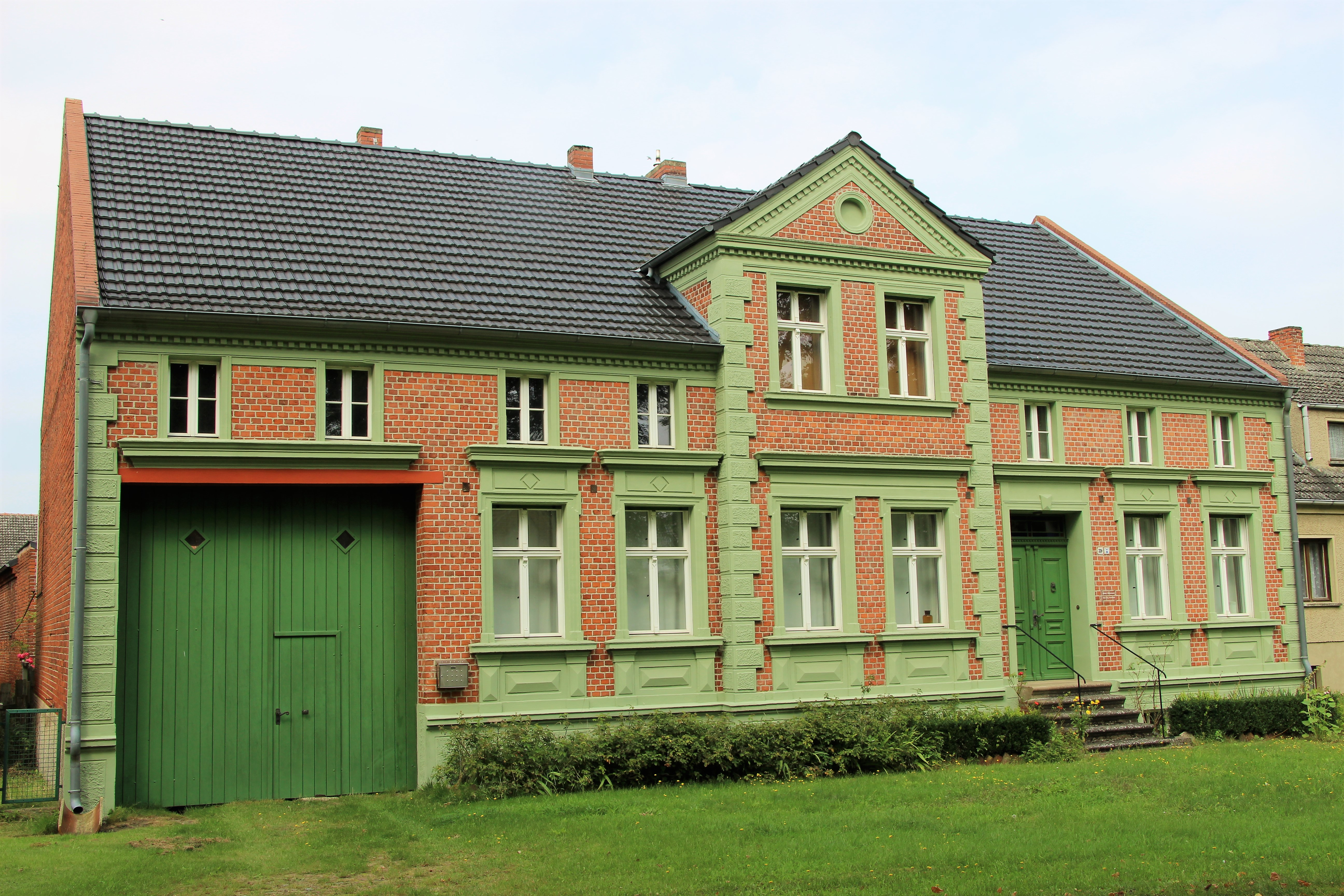 Damelack, Gemeinde Breddin, Baudenkmal Dorfstraße 39